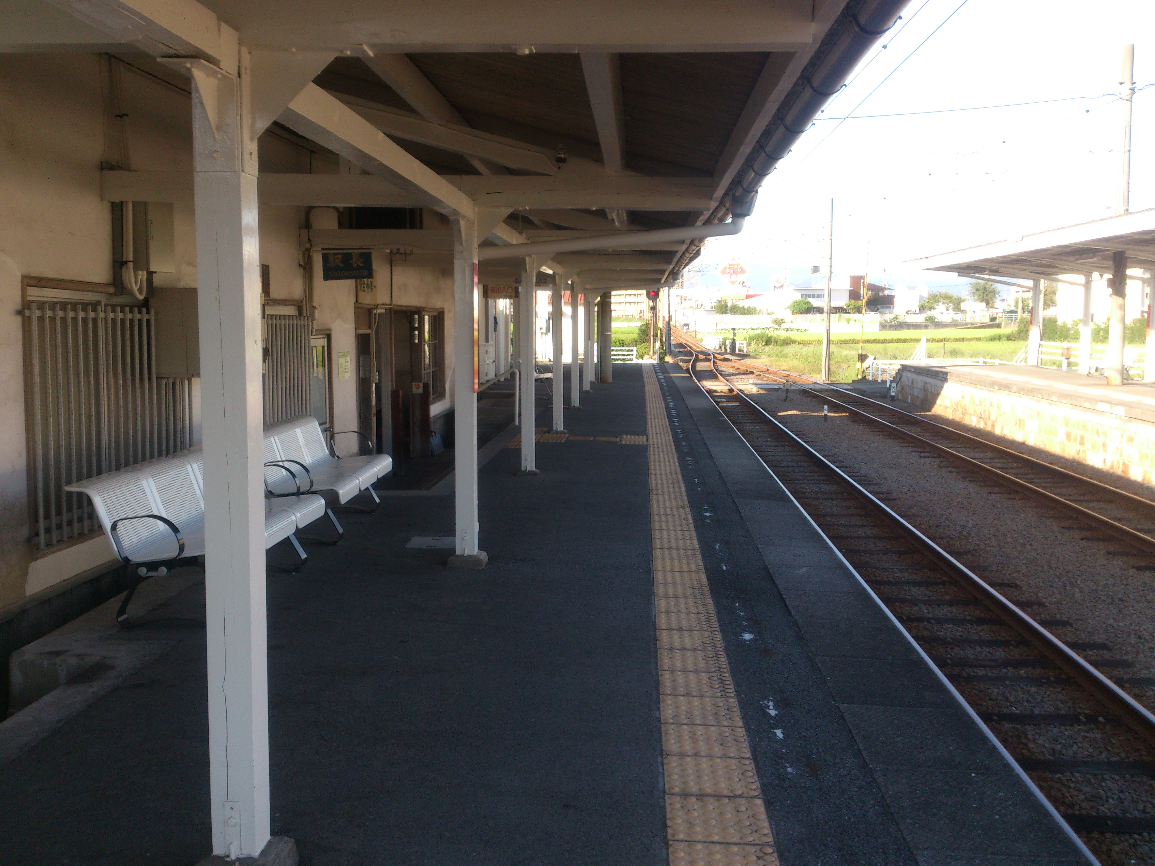 伊予鉄道 岡田駅のホーム